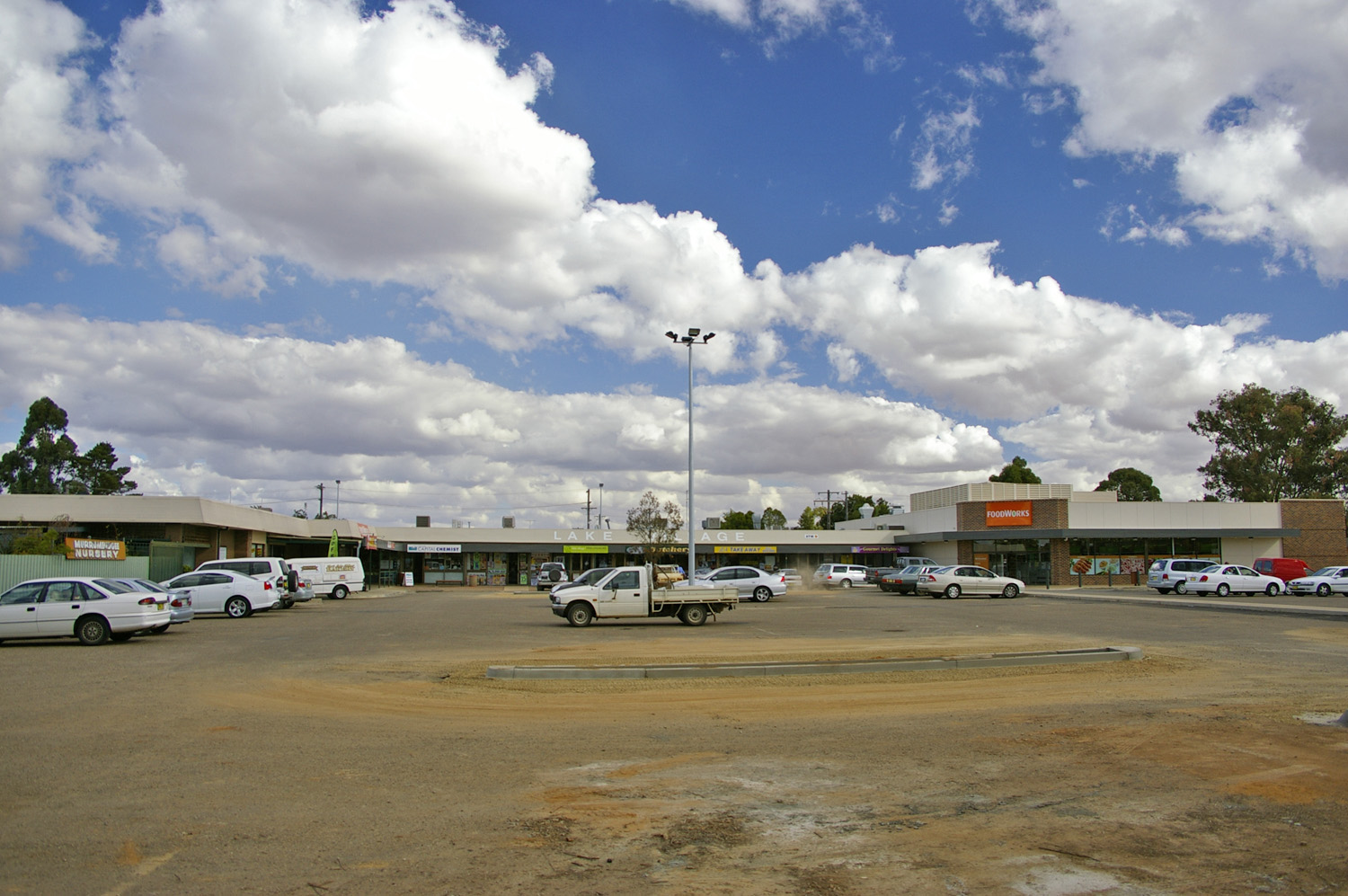 Lake Village Shopping Centre